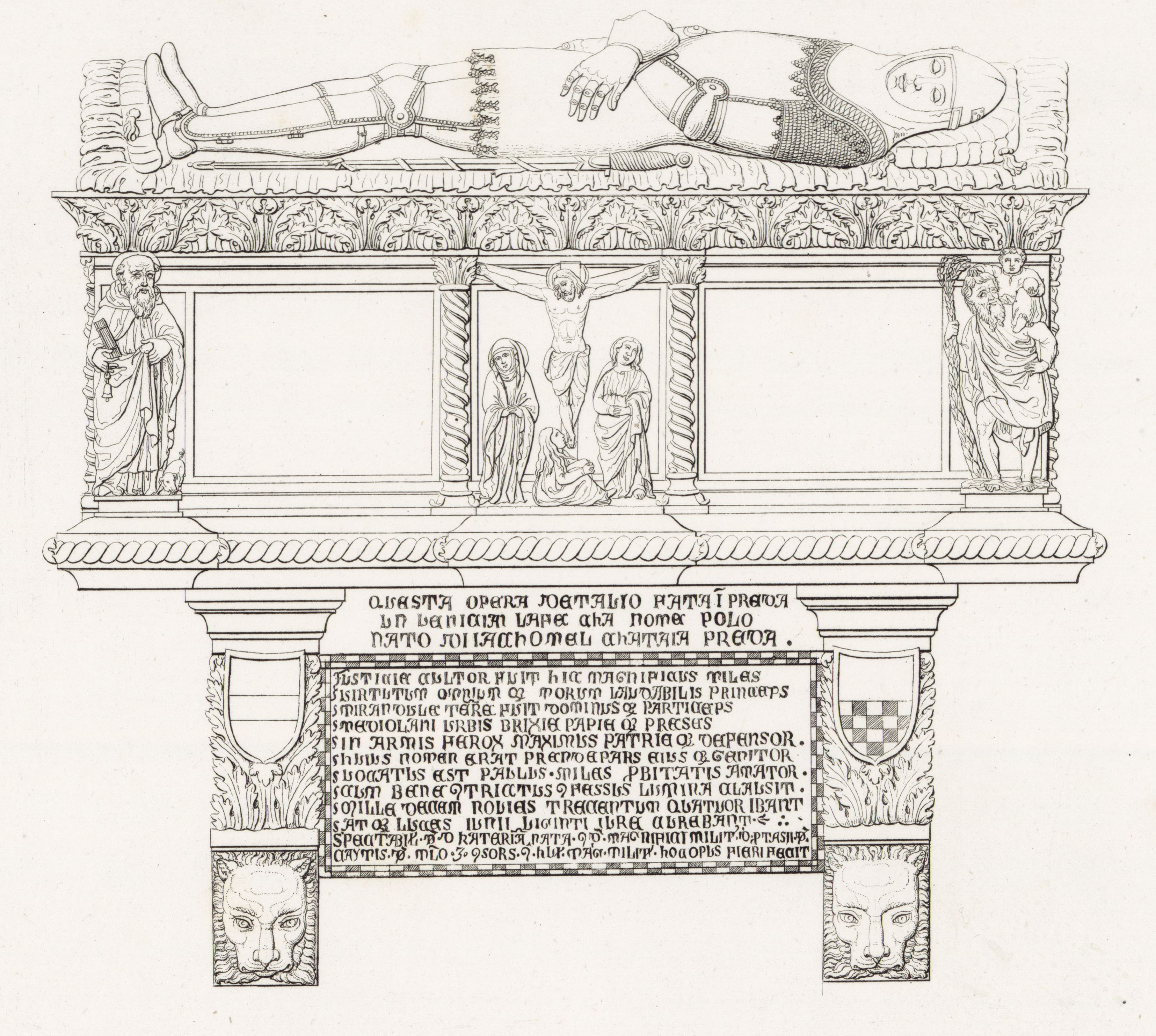 Disegno della tomba di Prendiparte Pico (fronte), presso la chiesa di San Francesco a Mirandola